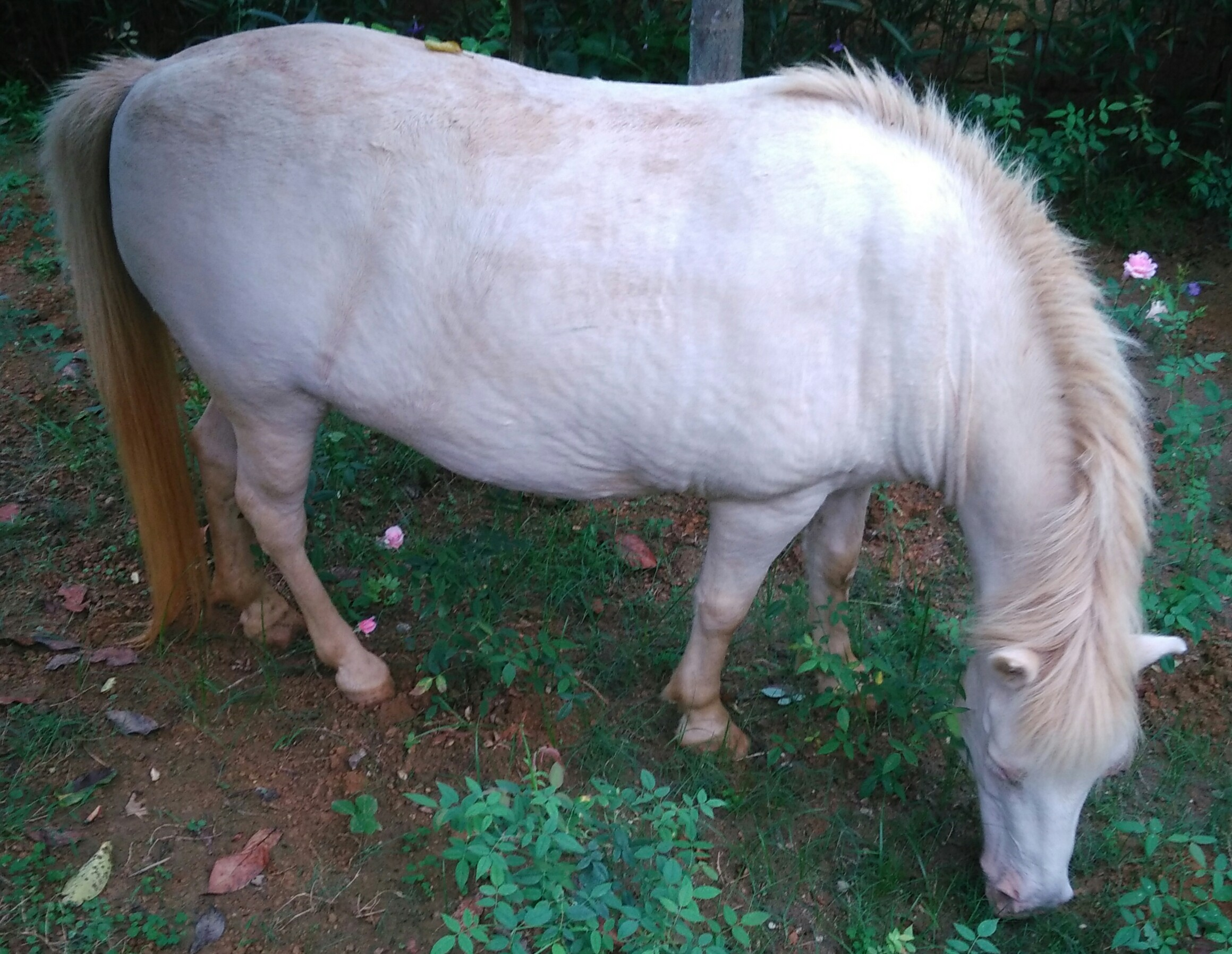 Hình tự chụp bằng máy ảnh cá nhân về một con ngựa bạch Việt Nam tại Trung Sơn Trầm, Sơn Tây